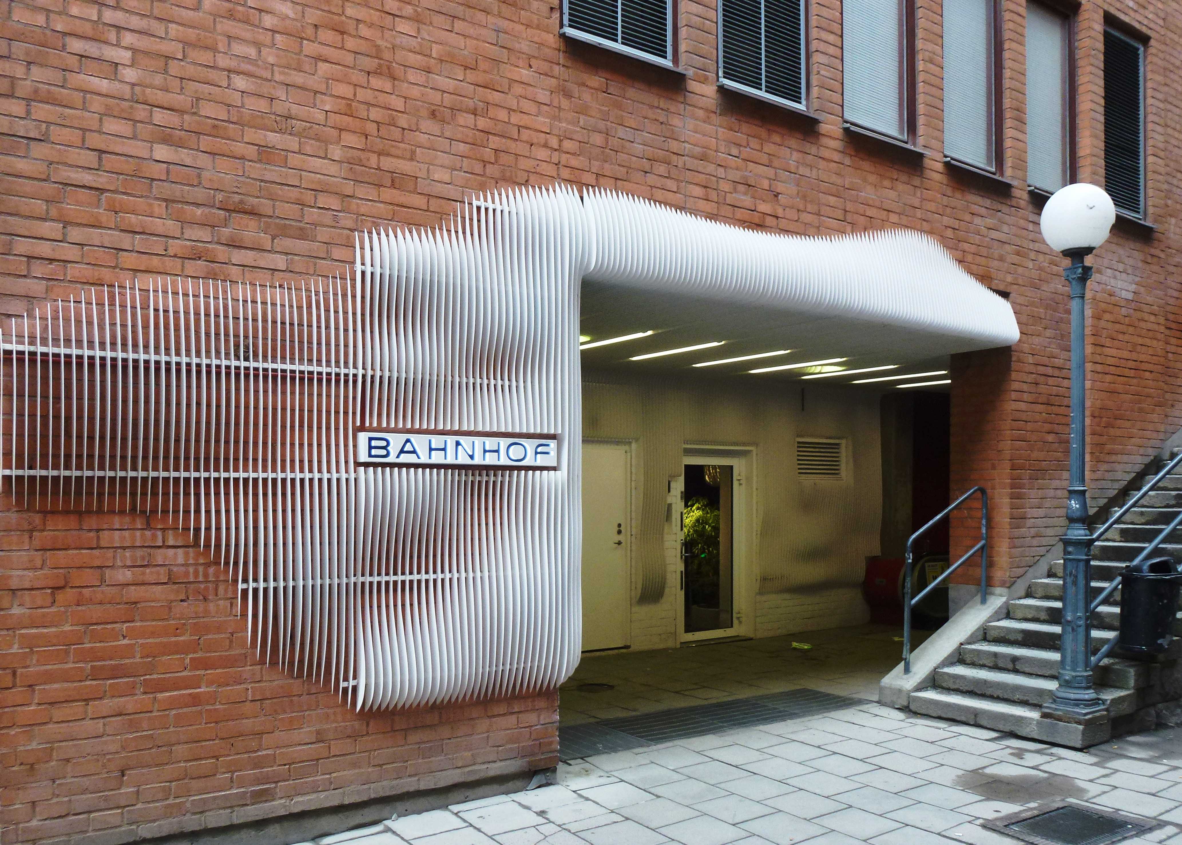 Entré till Bahnhof, Tunnelgatan 2, arkitekt Albert France-Lanord